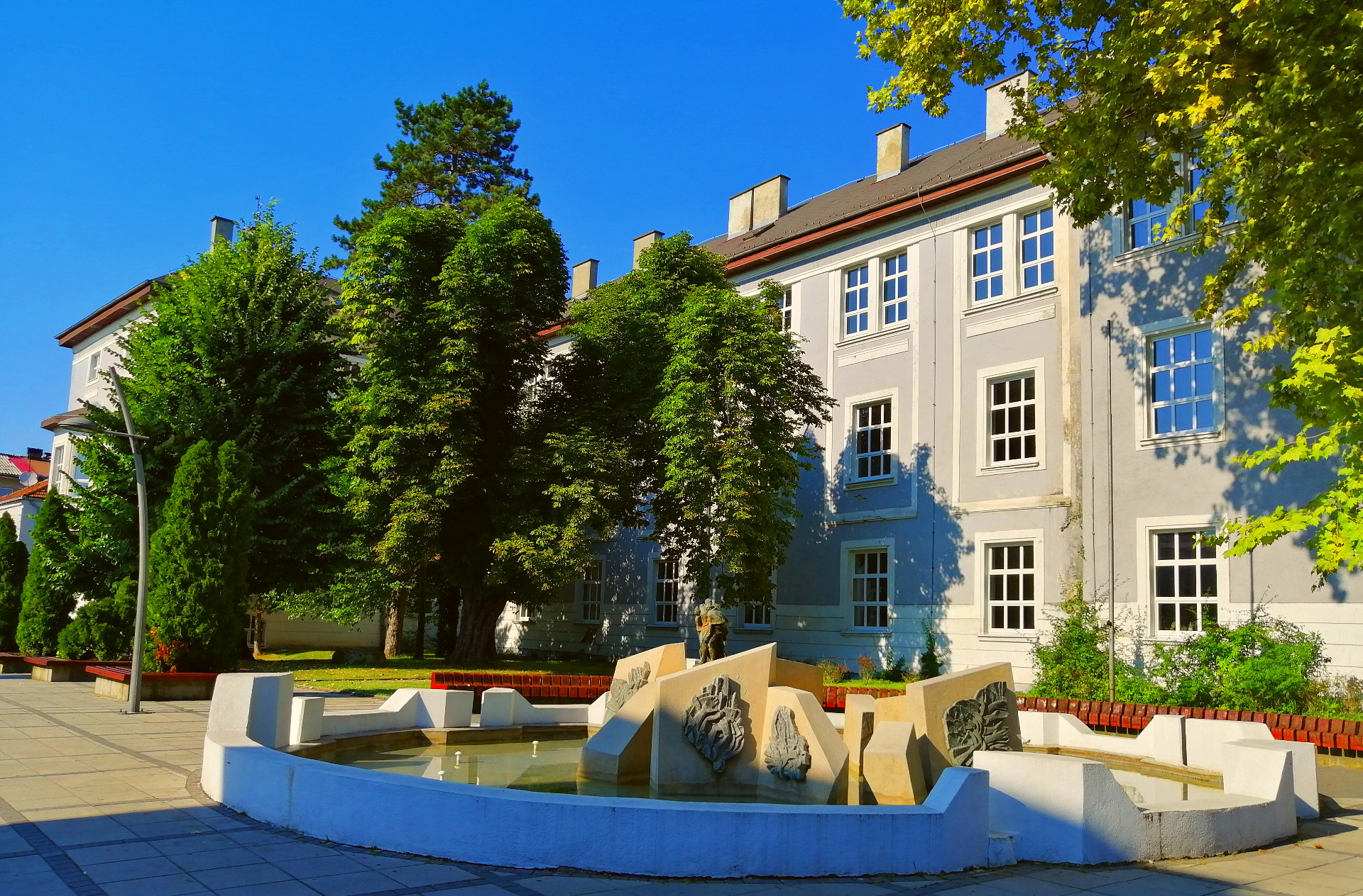 Зграда ОШ "Никола Тесла" Дервента